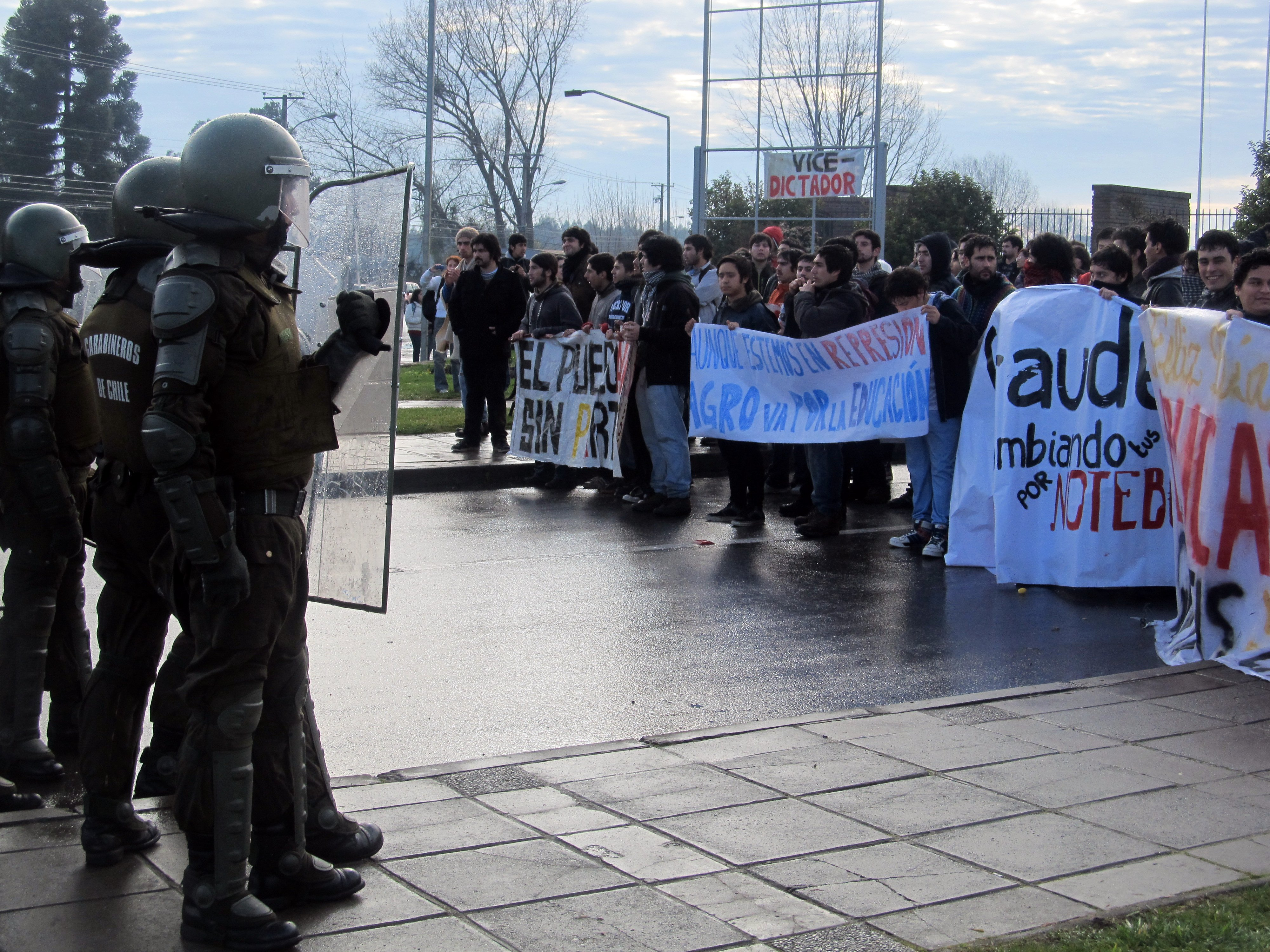 Universitarios protestan durante la Movilización estudiantil en Chile de 2011